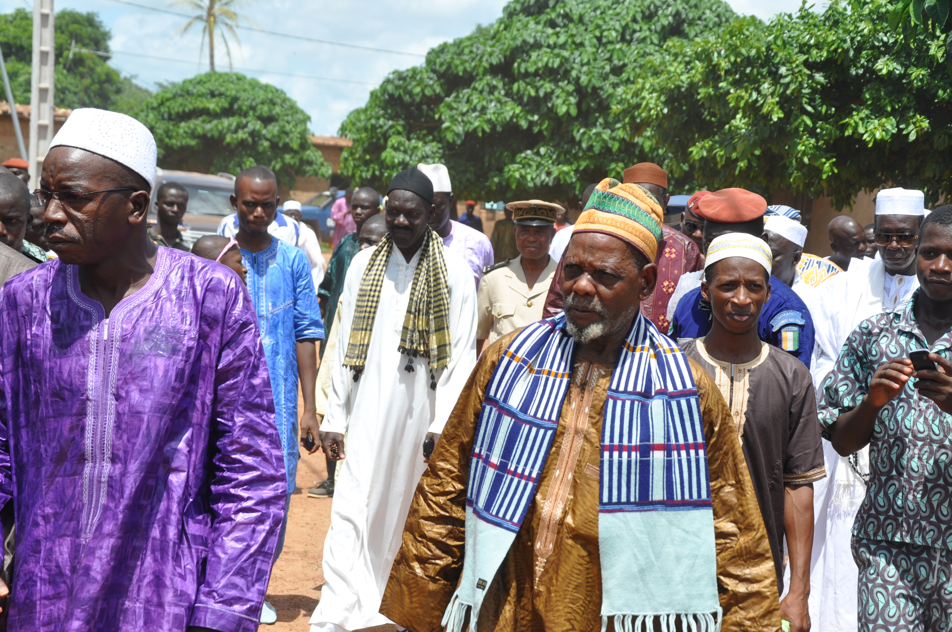 l’écharpe traditionnel typique des chefs religieux musulman du nord de la Côte d'Ivoire This is an image of Cultural Fashion or Adornment from Ivory Coast